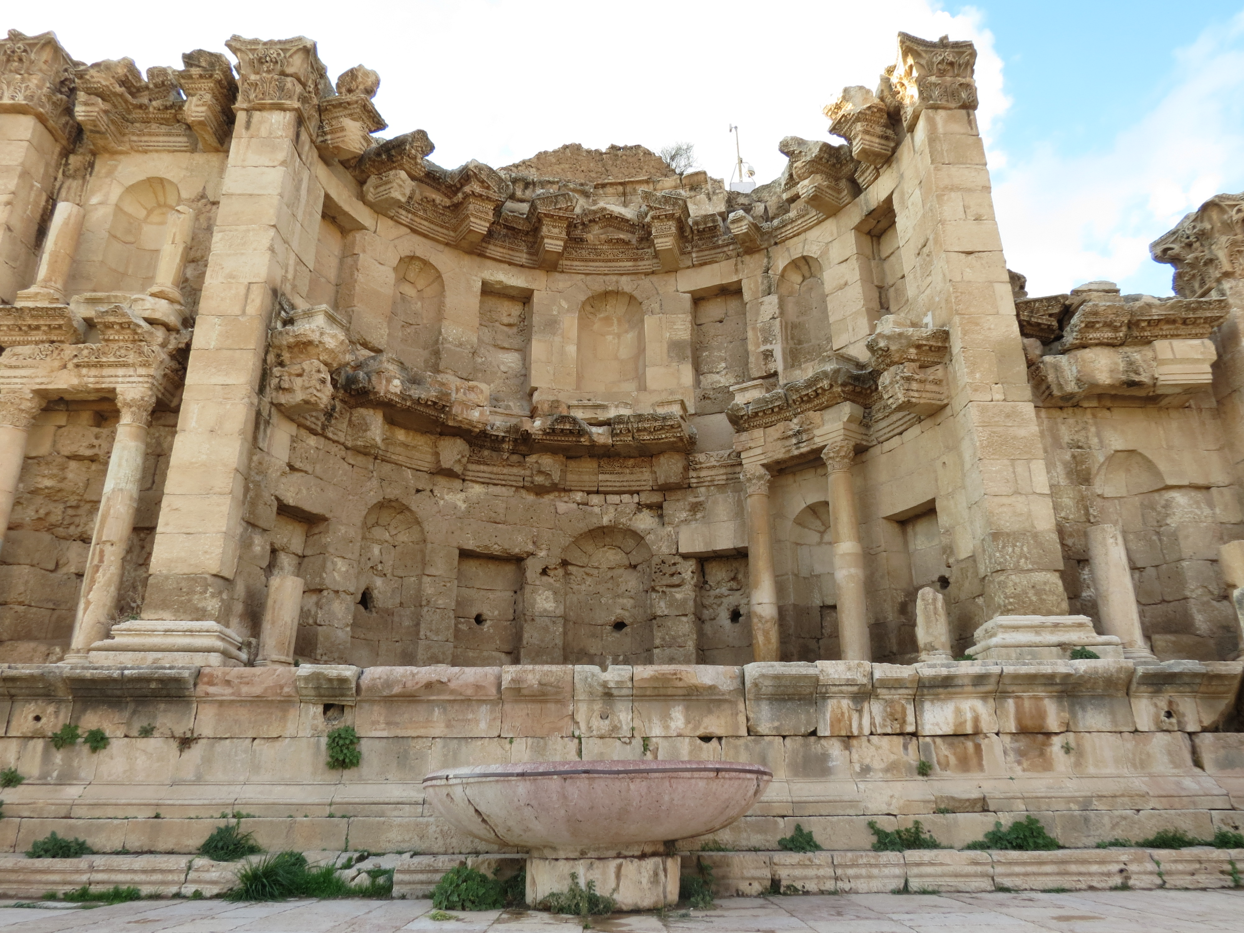 Une vue de la Jordanie.